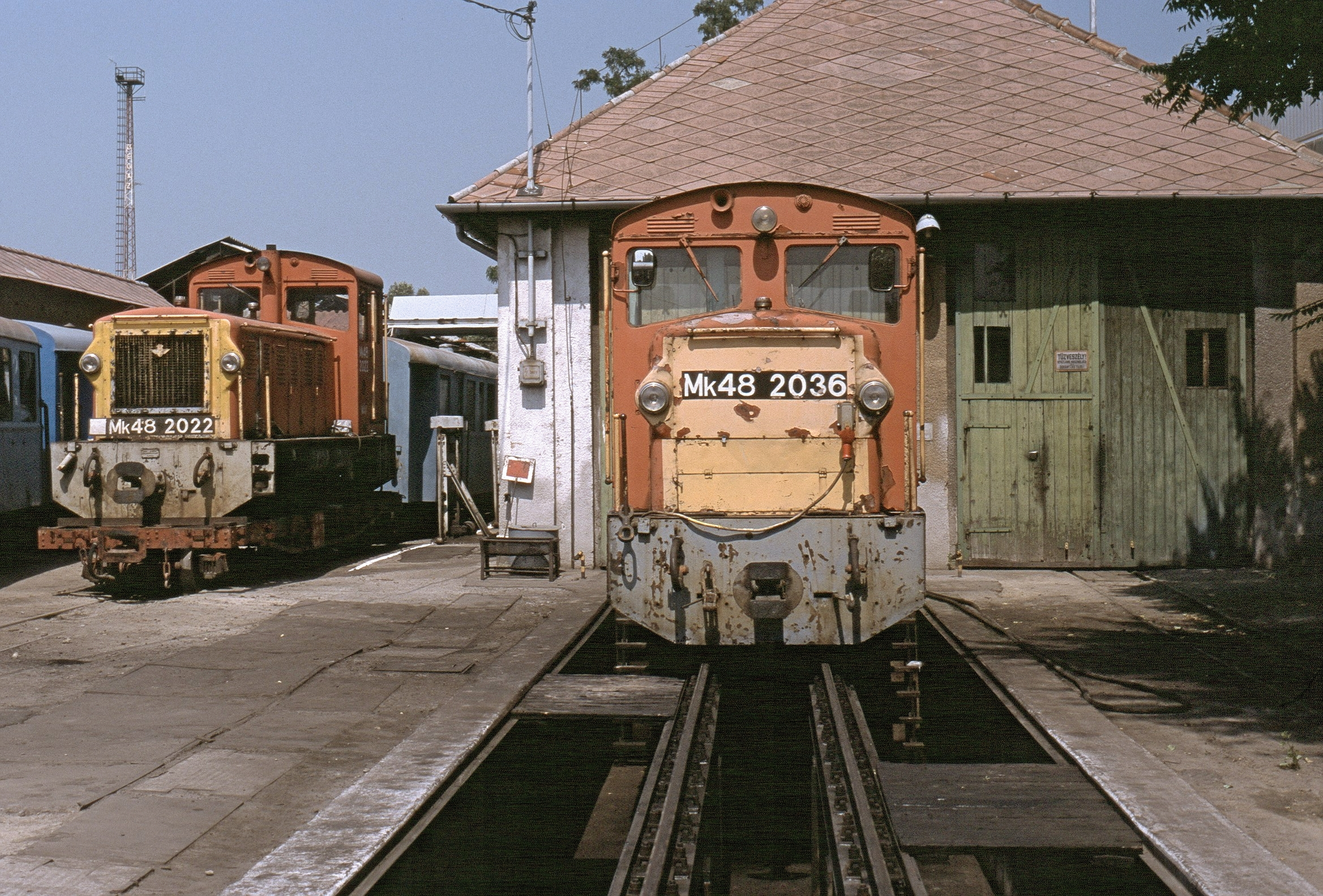 Kleinbahhnbetriebswerk Kecskemét